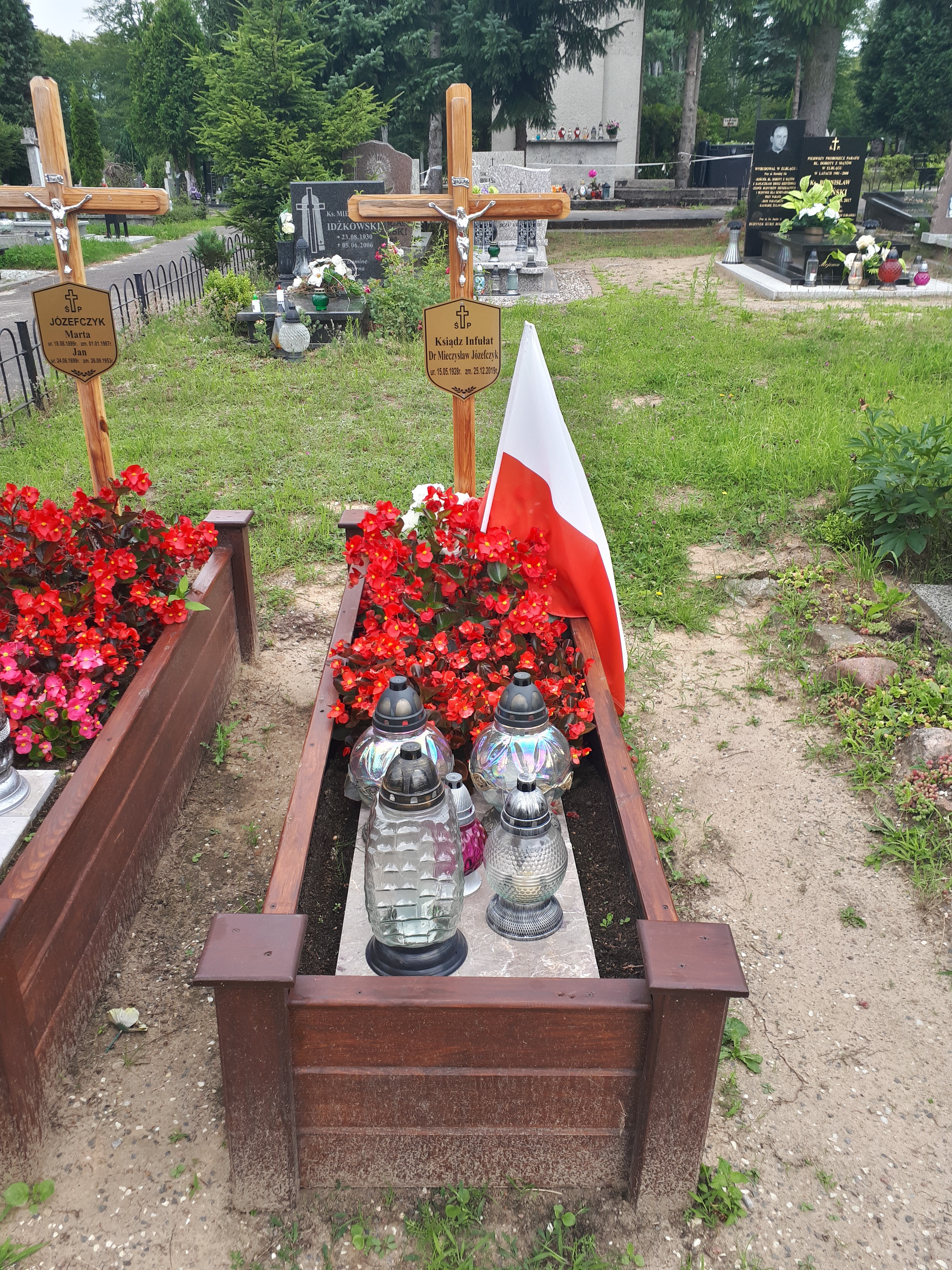 Grób księdza infułata Mieczysława Józefczyka w kwaterze księży na cmentarzu komunalnym Dębica